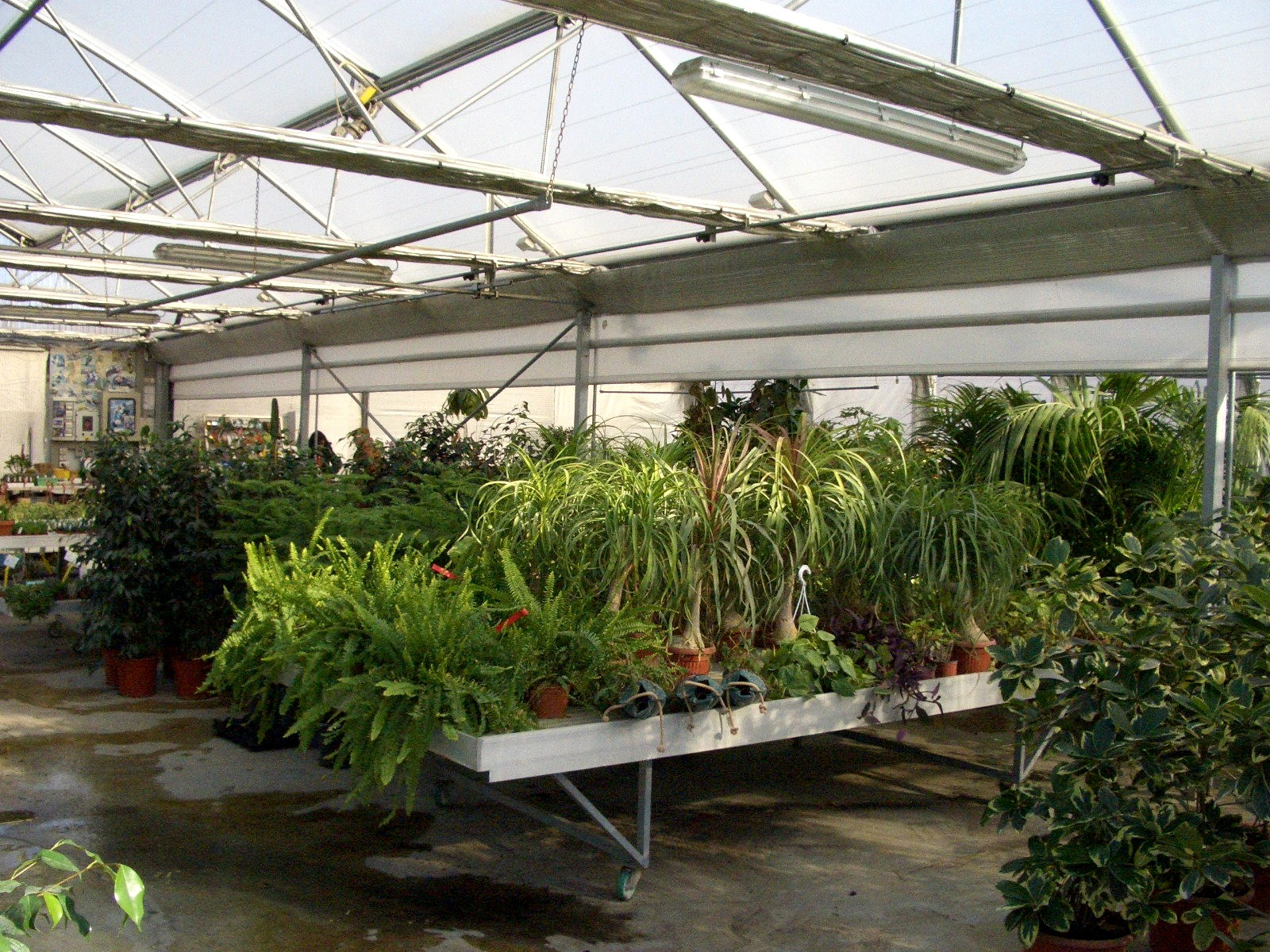 Foto scattata da me il 15.1.06